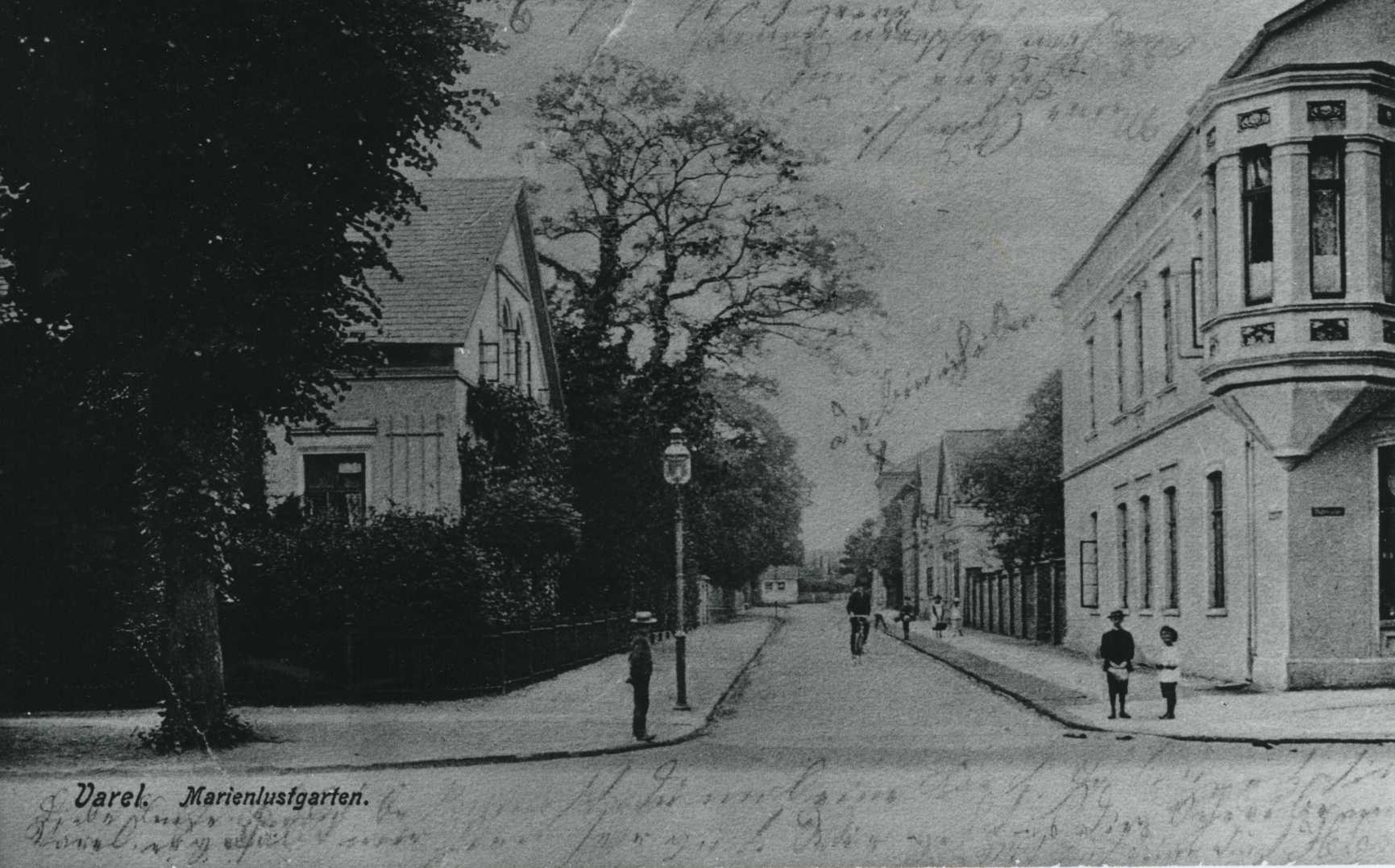 Blick von der Nebbsallee in die Moltkestraße; das Gelände gehörte vor der Bebauung zum "Marienlustgarten", dem Park des zwischen 1860 und 1871 abgerissenen Vareler Schlosses. - Hardekopf verlebte seine Kindheit und Jugend (1876 bis 1891) in Varel.